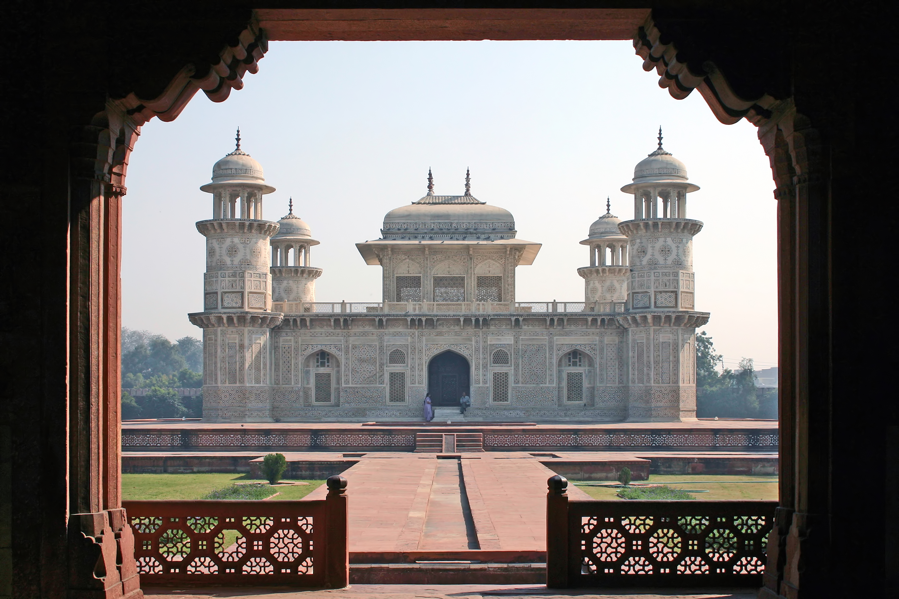 Mausoleum des Itimad-ud-Daula, erbaut 1622-1628, in Agra, Indien